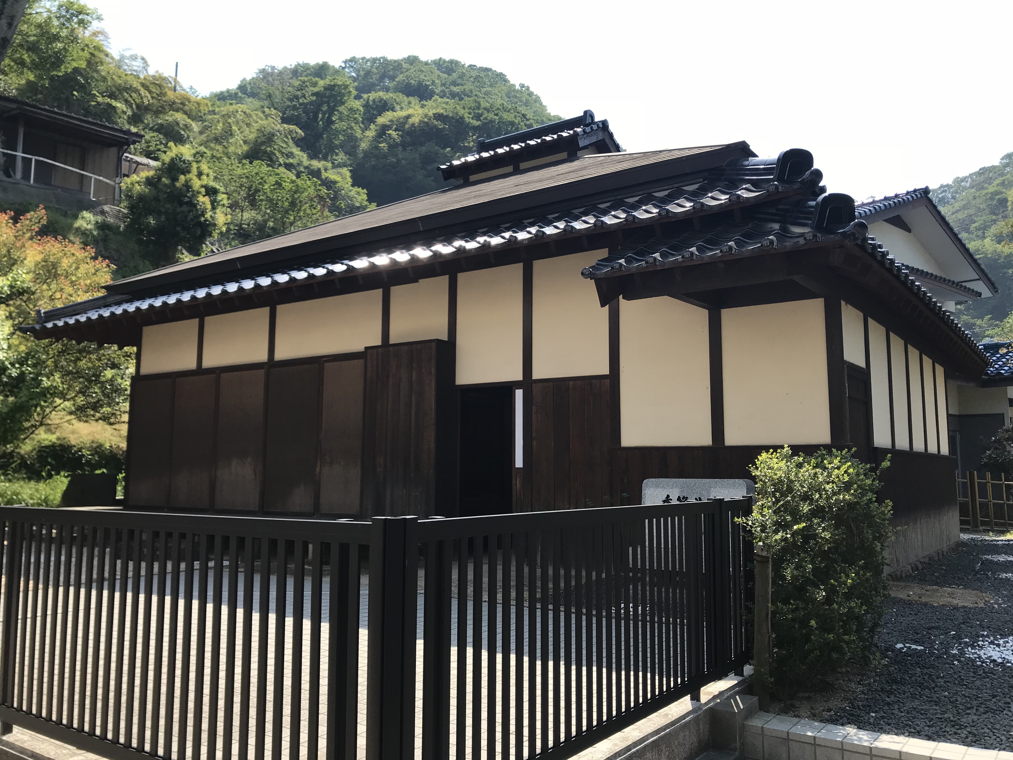 本因坊秀策囲碁記念館にある復元秀策生家